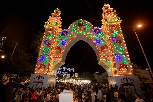 Vista frontal de la feria de san pedro